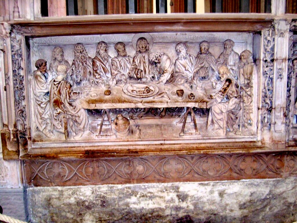 Heinrich Brabender: Passionsrelief aus Baumberger Sandstein von 1500-1520 in der Marienkirche